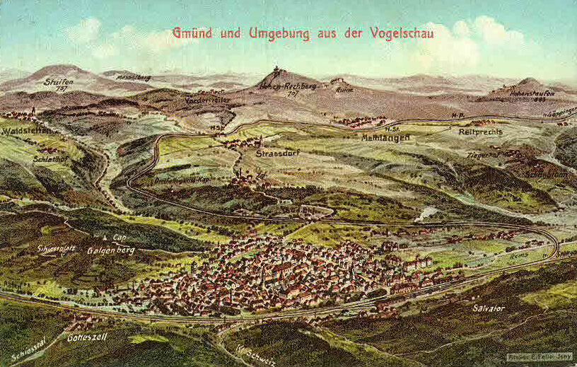 Ansichtskarte von Eugen Felle; Technoseum (Landesmuseum für Technik und Arbeit Mannheim) Motiv: Gmünd und Umgebung